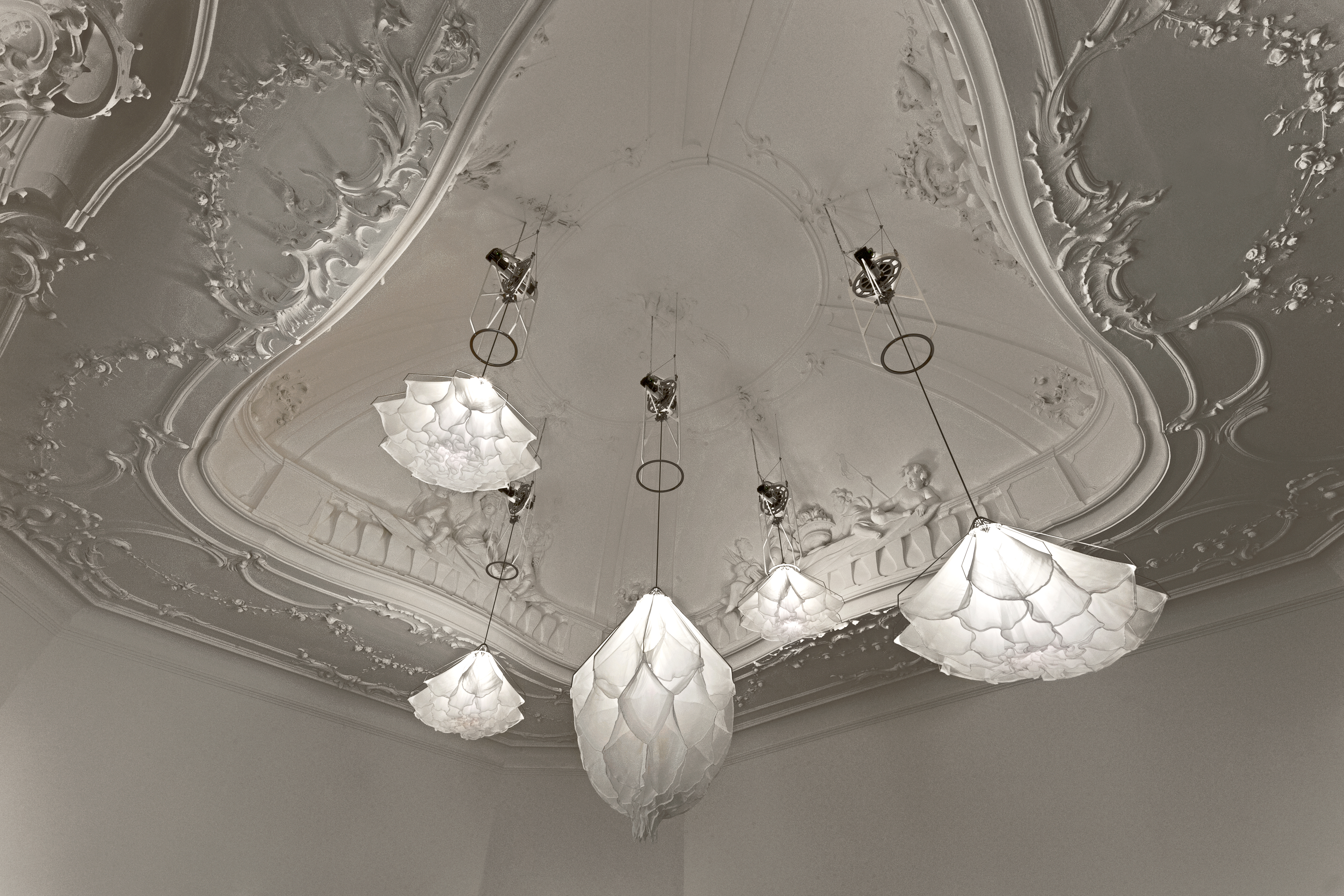 Photo by Hesmerg